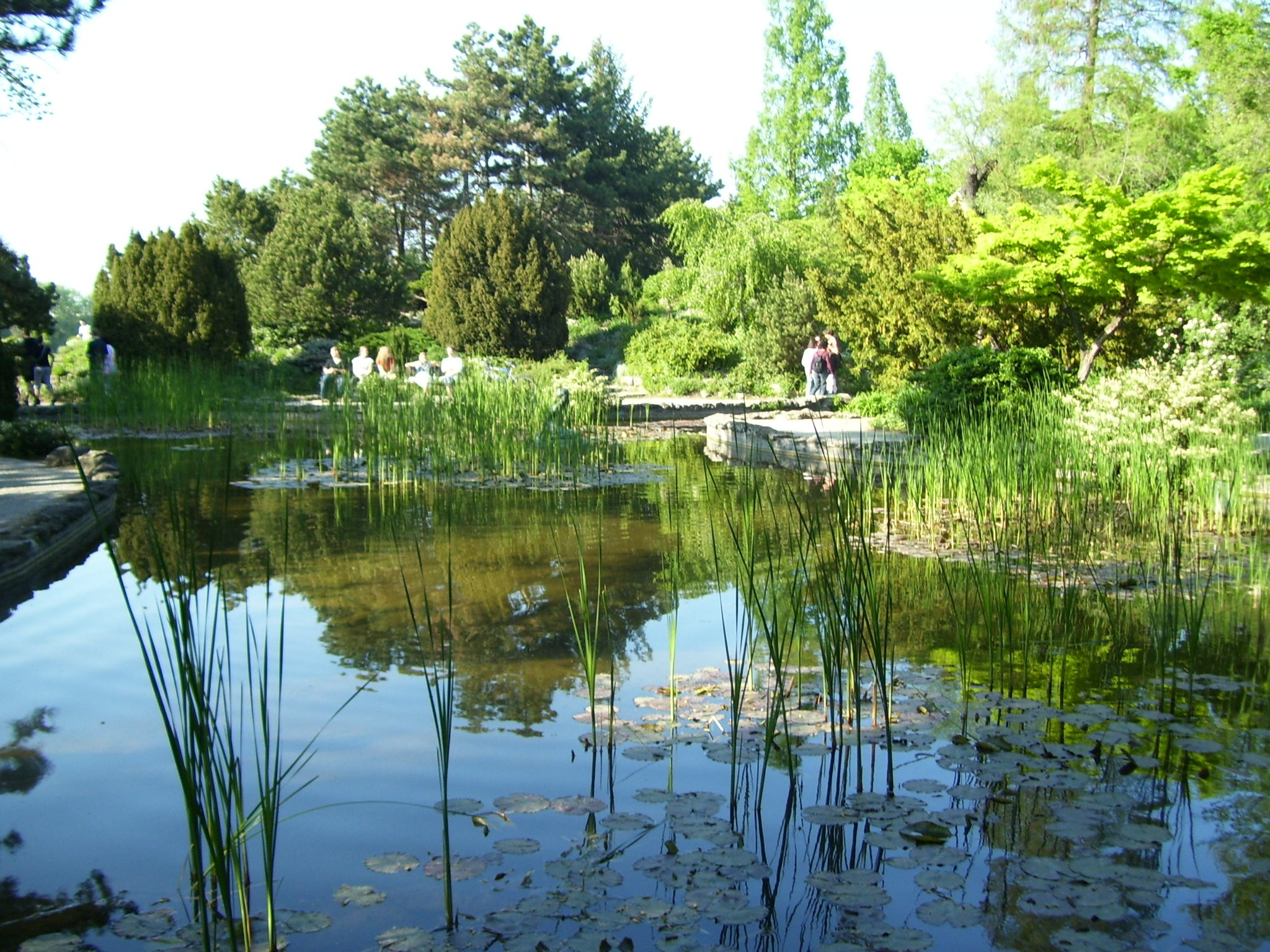 Japánkert a budapesti Margit-szigeten